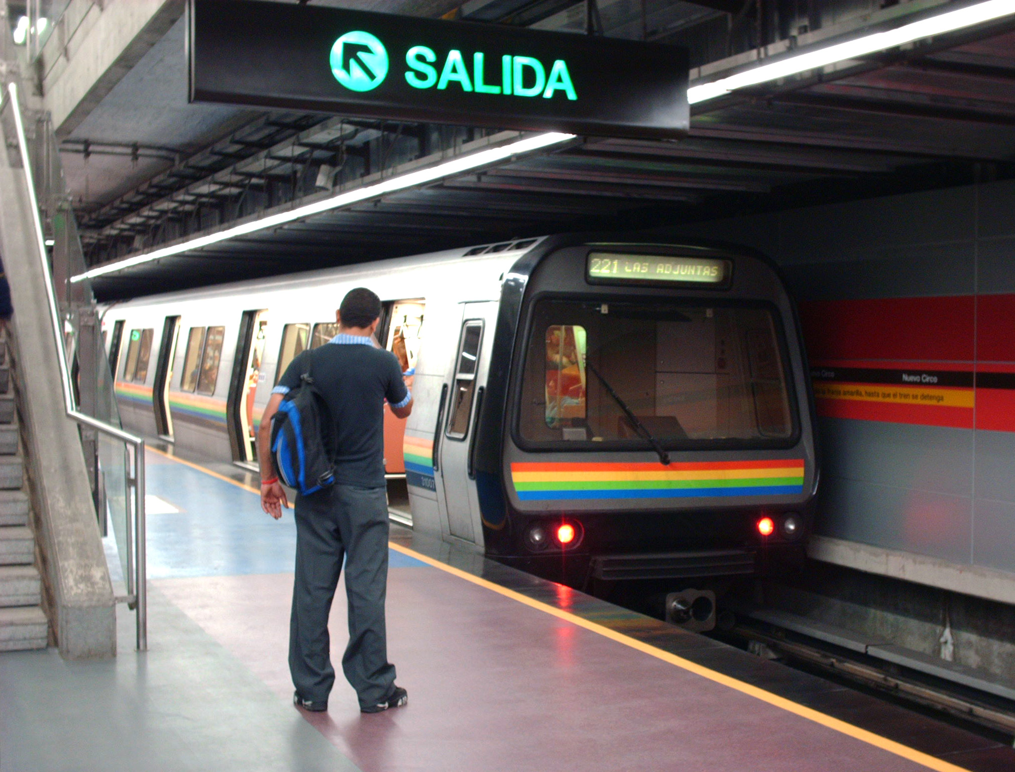 Estación Nuevo circo, Linea 4, Metro de Caracas